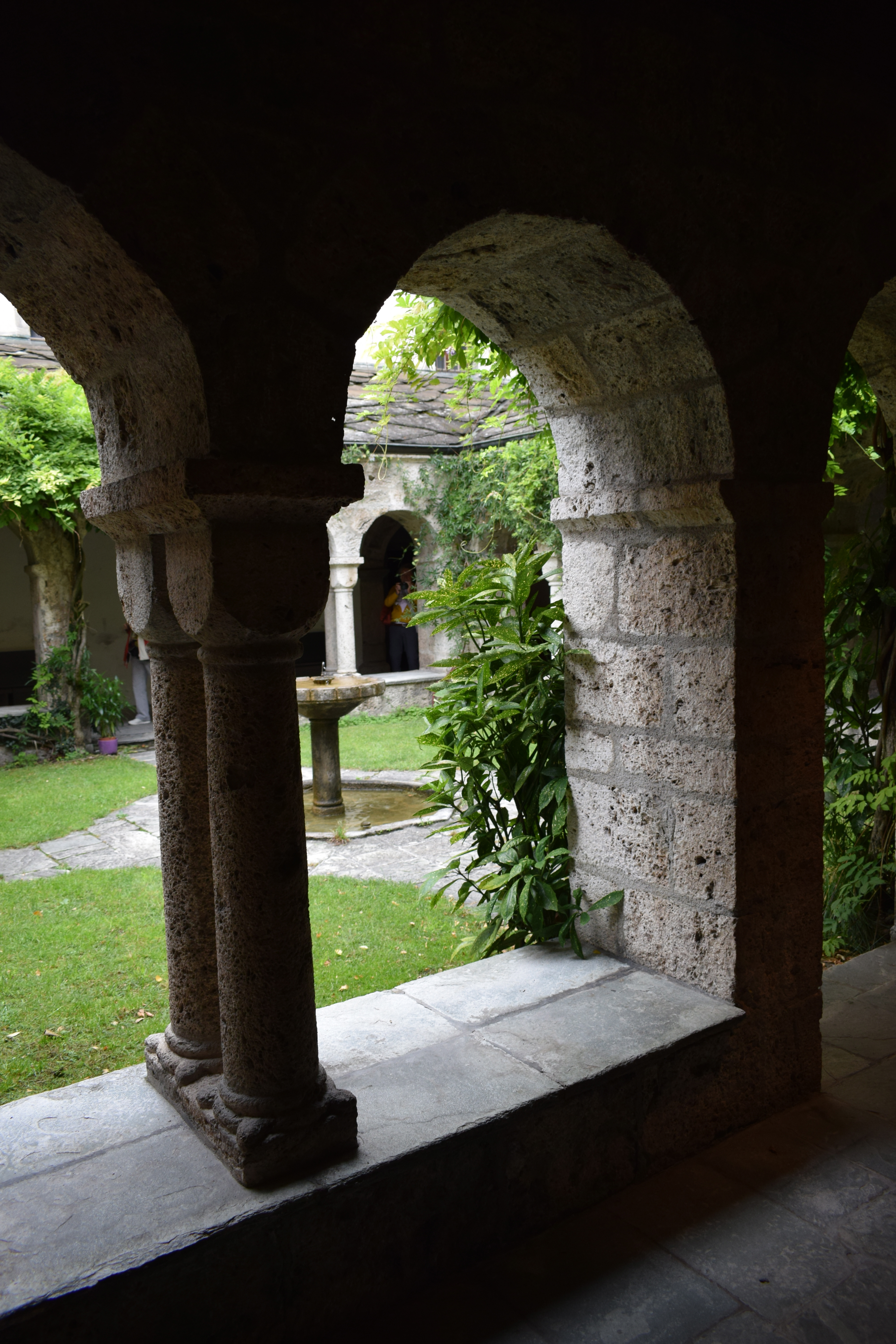 Vue de l'abbaye de Saint-Maurice d'Agaune, dans le canton du Valais en Suisse.